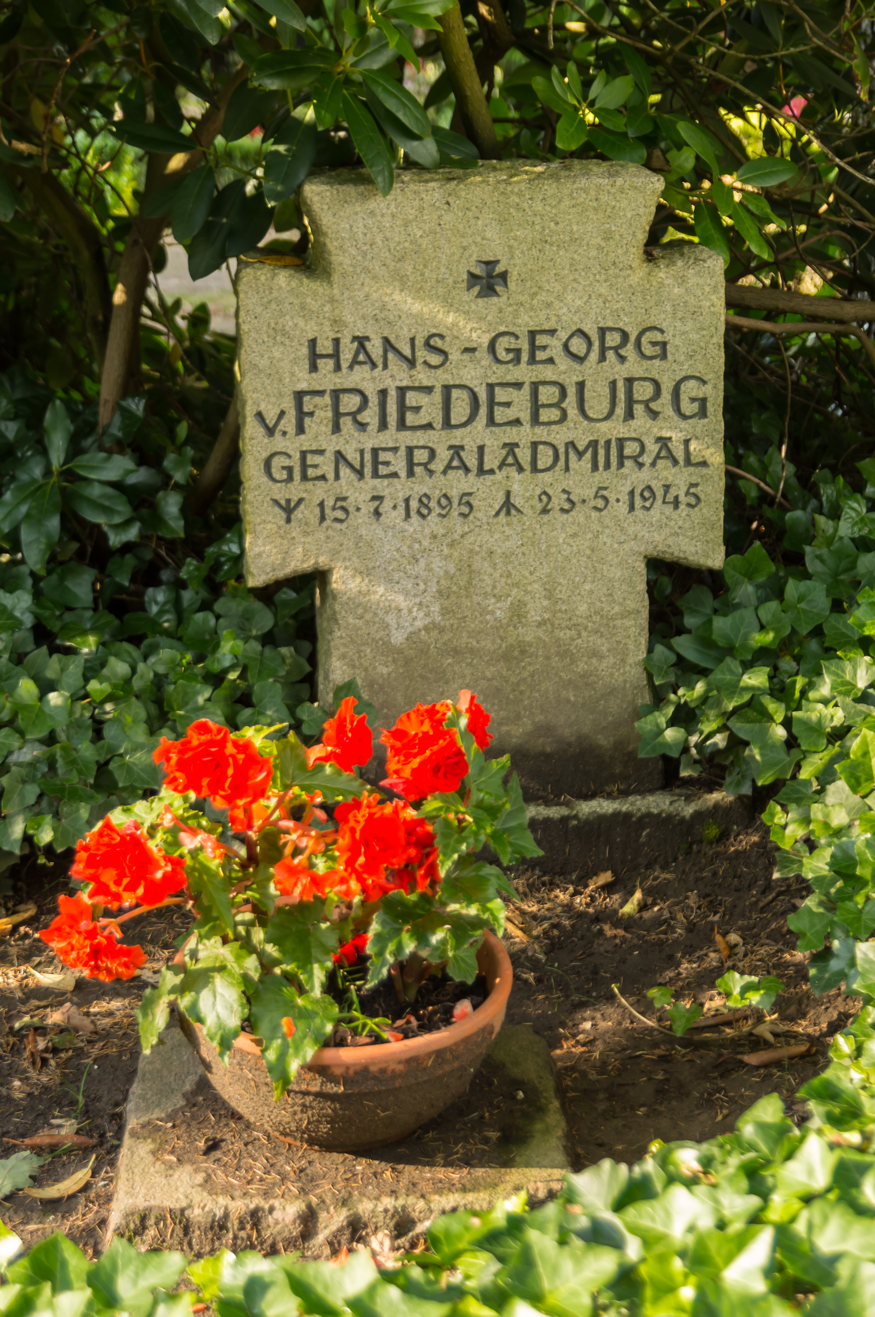 Grabmal Hans-Georg Friedrich Ludwig Robert von Friedeburg (* 15. Juli 1895 in Straßburg; † 23. Mai 1945 in Flensburg-Mürwik) auf dem Friedhof Adelby (Flensburg). Generaladmiral.Oberbefehlshaber der Kriegsmarine. Mitunterzeichner beider Kapitulationsurkunden.